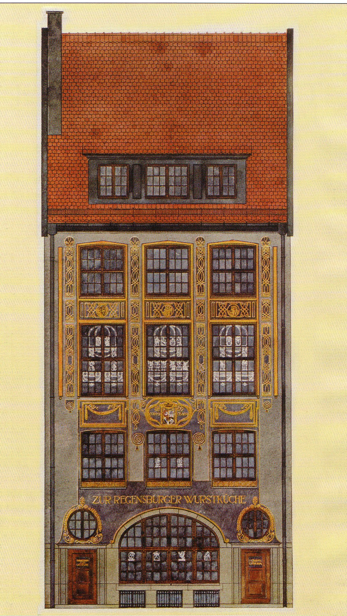 Corpshaus der Cisaria; Münzstr. 8 (früher Nr. 2), München. Das Haus wurde 1910 eingeweiht und 1944 bei den Bombardierungen Münchens zerstört. Der Architekt war Richard Schachner, Prof. an der Technischen Hochschule München. Die Abbildung beruht auf einem Gemälde (wahrscheinlich von Paul Neu). u